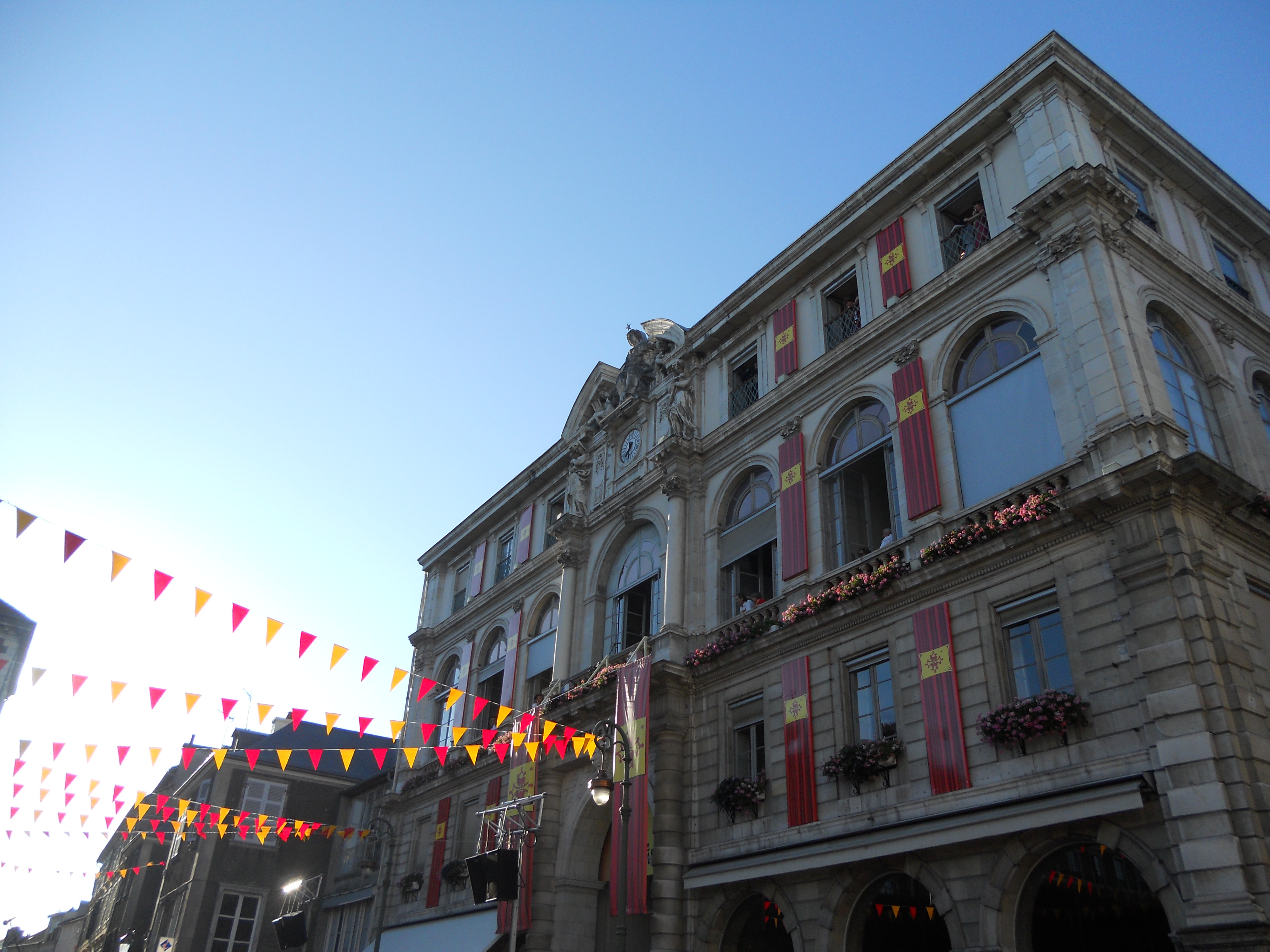 Hôtel de Ville de Pau durant Hestivoc